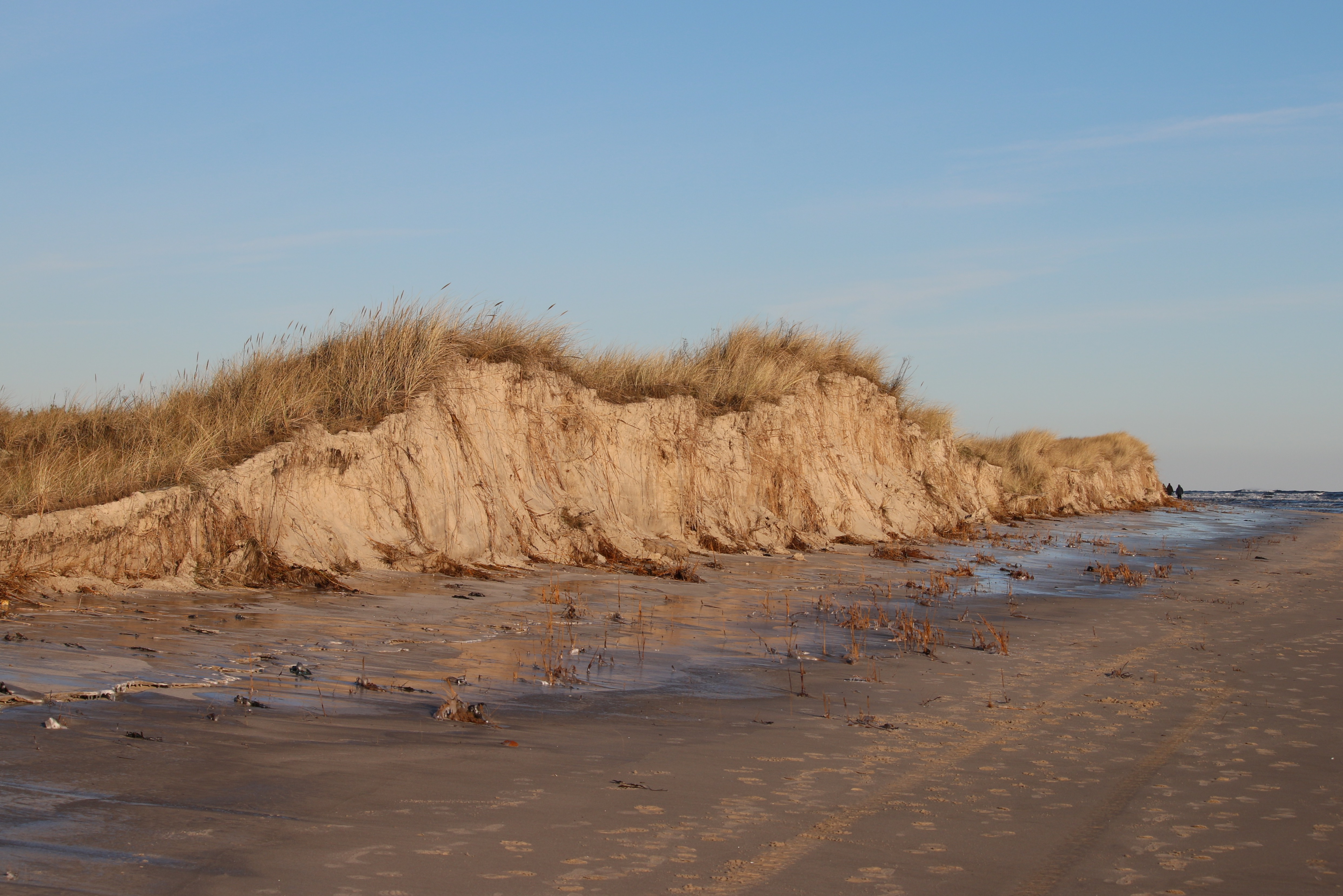 Sandhammarens naturreservat